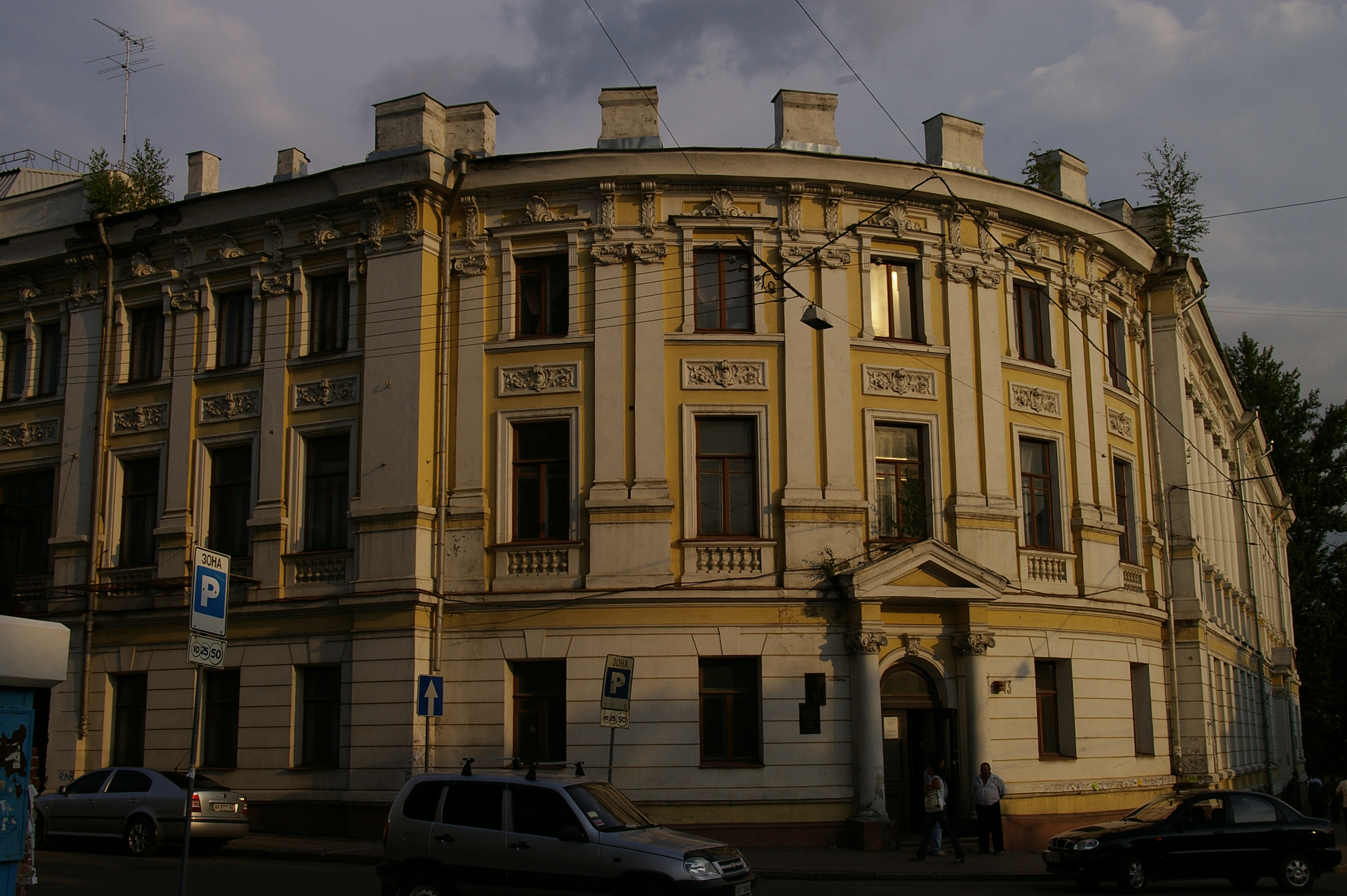 Харьков